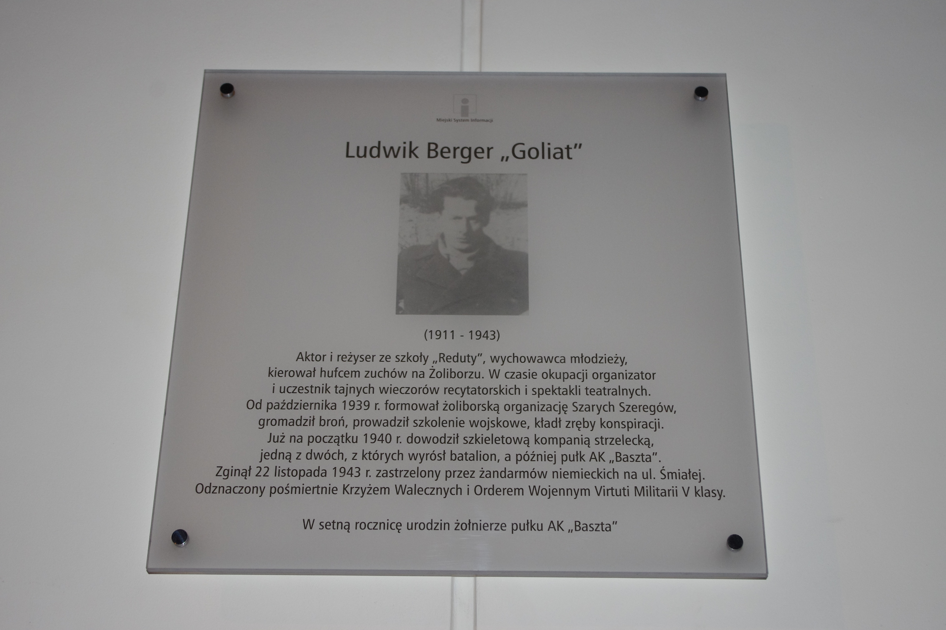 Tablica Miejskiego Systemu Informacji upamiętniająca aktora i reżysera Ludwika Bergera ps. "Goliat" , na ul. Śmiałej Warszawie, gdzie zginął